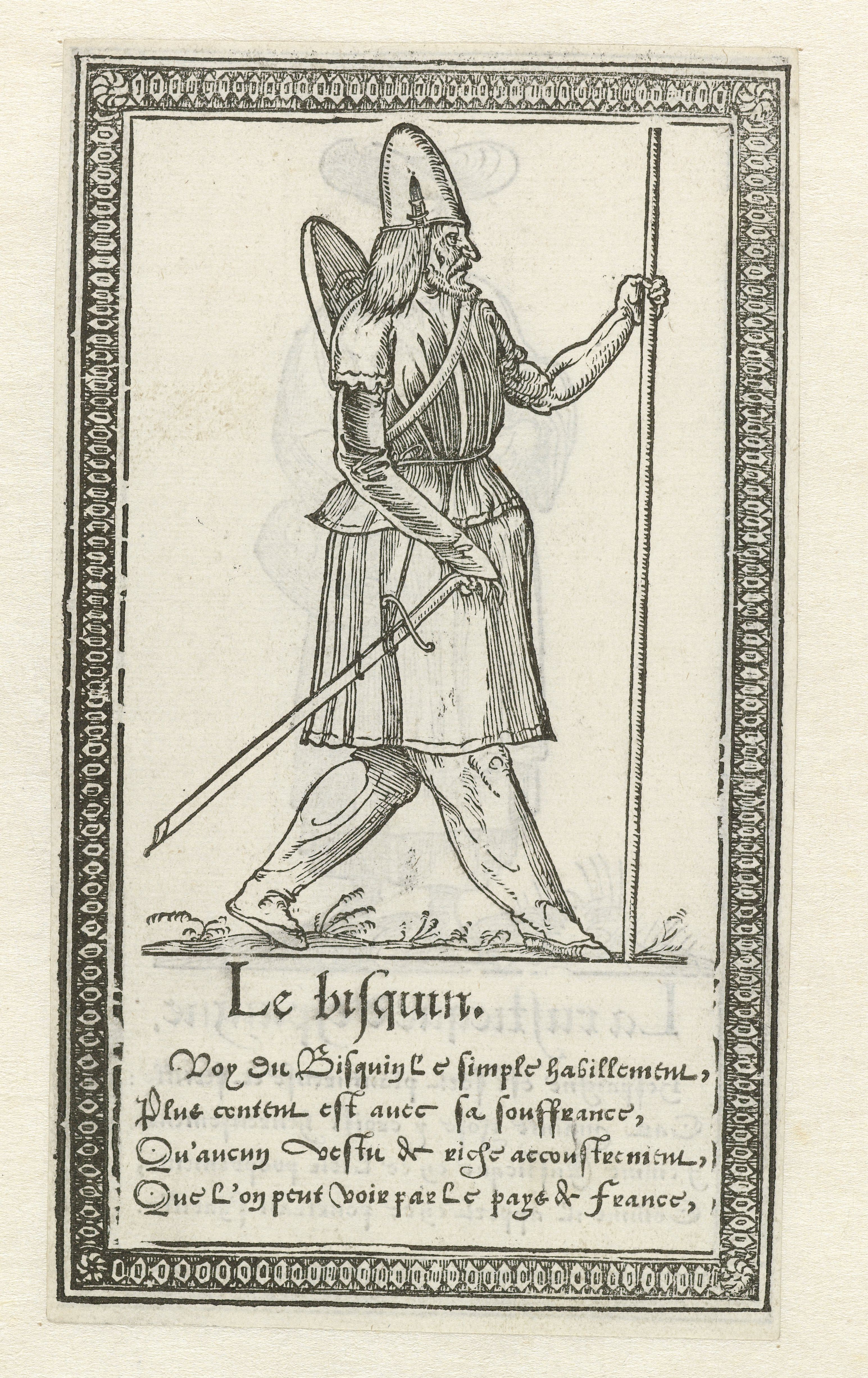 IdentificatieTitel(s): Man in Baskische klederdrachtLe bisquin (titel op object)Serie van verschillende klederdrachten (serietitel)Recueil de la diversité des habits (serietitel)Objecttype: prent Objectnummer: RP-P-OB-33.880Catalogusreferentie: IFF 16e siècle 72Opschriften / Merken: verzamelaarsmerk, verso, gestempeld: Lugt 2228VervaardigingVervaardiger: prentmaker: François Desprezuitgever: Richard BretonPlaats vervaardiging: ParijsDatering: 1562Fysieke kenmerken: houtsnede; voorstelling en ornamentrand gedrukt van twee platenMateriaal: papier Techniek: houtsnedeAfmetingen: blad: h 146 mm × b 85 mmToelichtingDit is prent 72 uit een serie van 121. Binnen deze serie zijn er prenten gemaakt naar voorbeelden van Jean-François de Roberval en Enea Vico, onbekend welke precies.OnderwerpWat: folk costume, regional costumeweaponsfashion platesVerwerving en rechtenVerwerving: onbekend 2006Copyright: Publiek domein